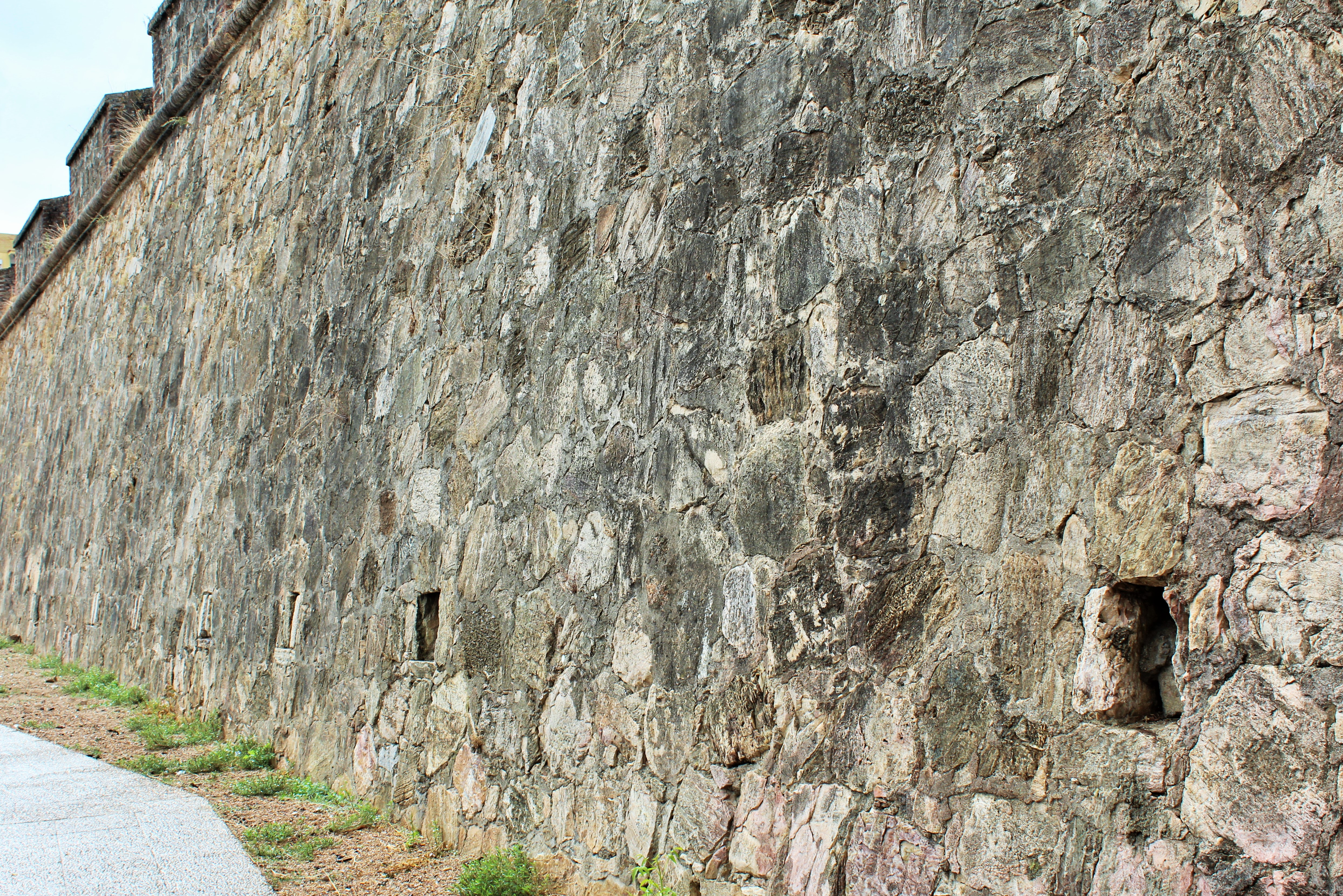 Detalle de galería de fusilería y aspilleras.